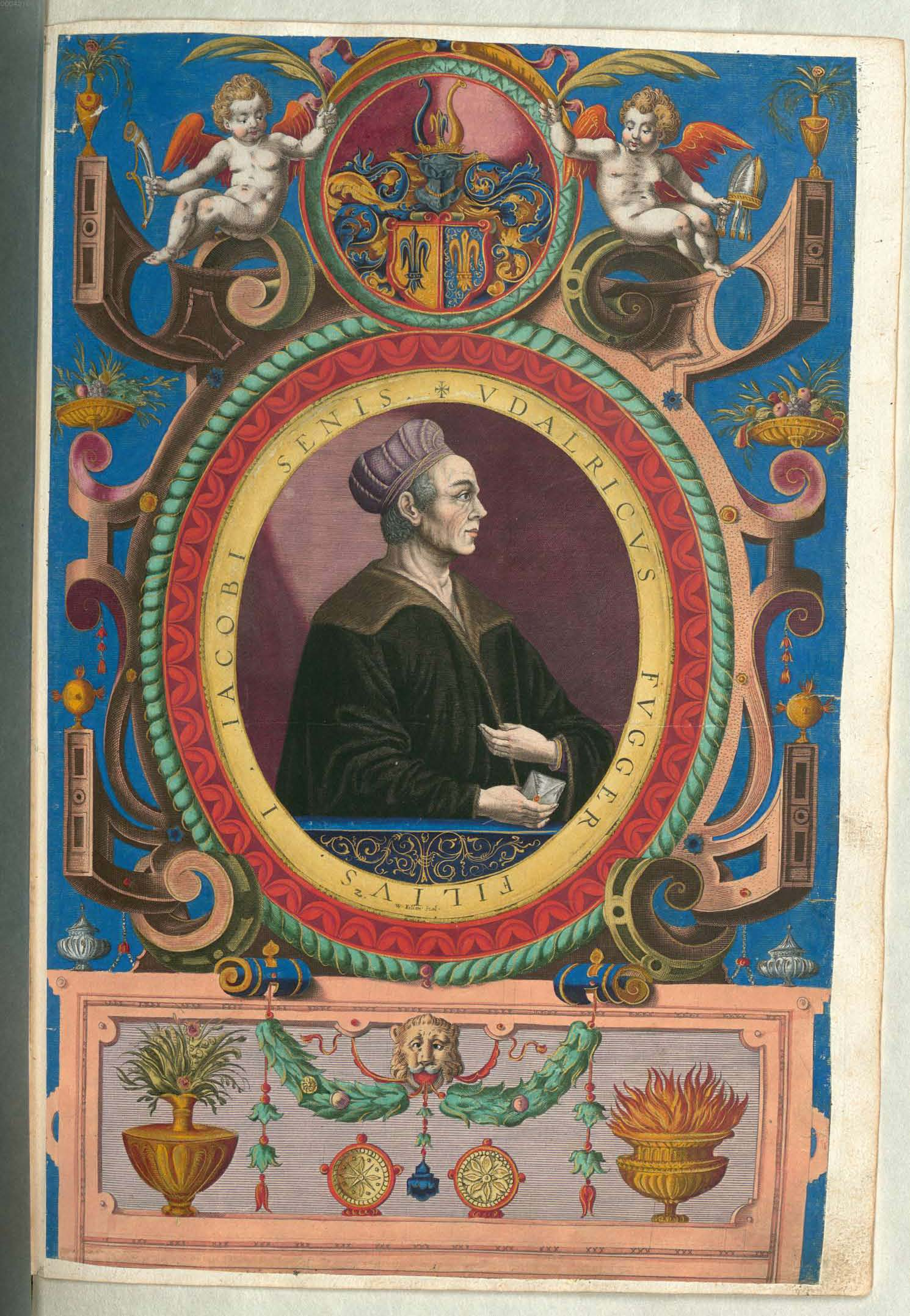 Fuggerorum et Fuggerarum imagines wurde 1588 von Philipp Eduard Fugger beim Kupferstecher Dominicus Custos in Auftrag gegeben. Das Werk enthält mit Aquarell- und Gouache-Farbe kolorierte Stiche der Mitglieder der Fugger von der Lilie. Der Druck von 1618 stellt das einzige kolorierte Exemplar dar. Ulrich Fugger der Ältere (1441-1510), Sohn des Jakob Fugger d. Ä. (1398-1469)